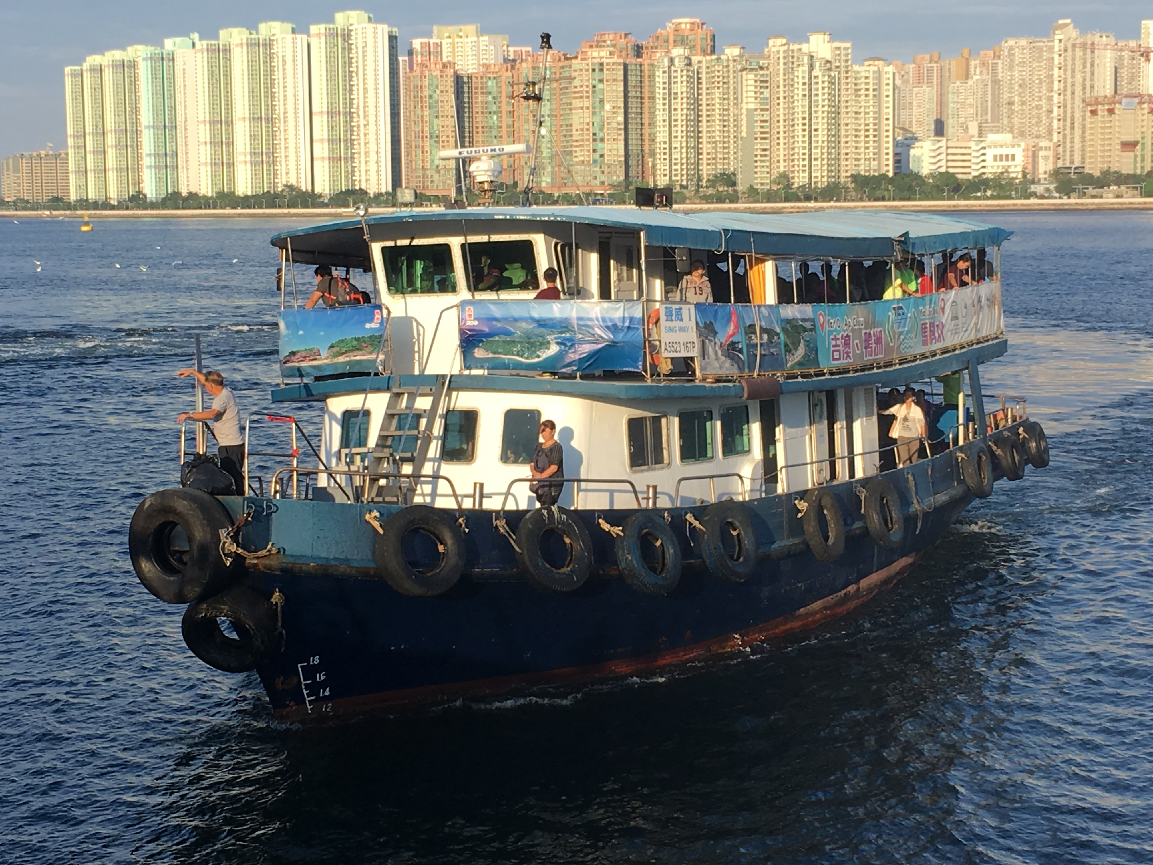 This photo is taken in Ma Liu Shui.